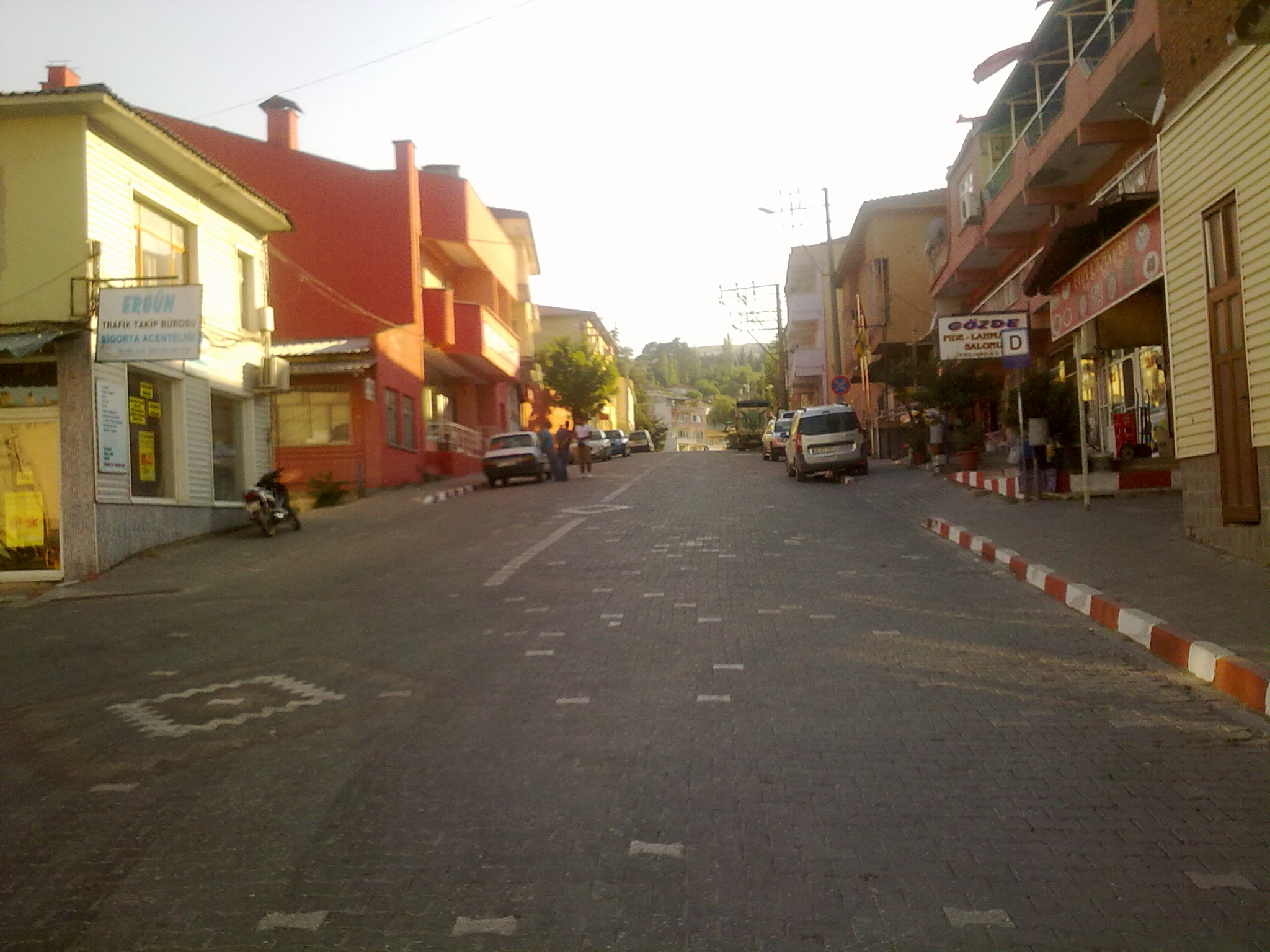 Balya'nın ana caddesi